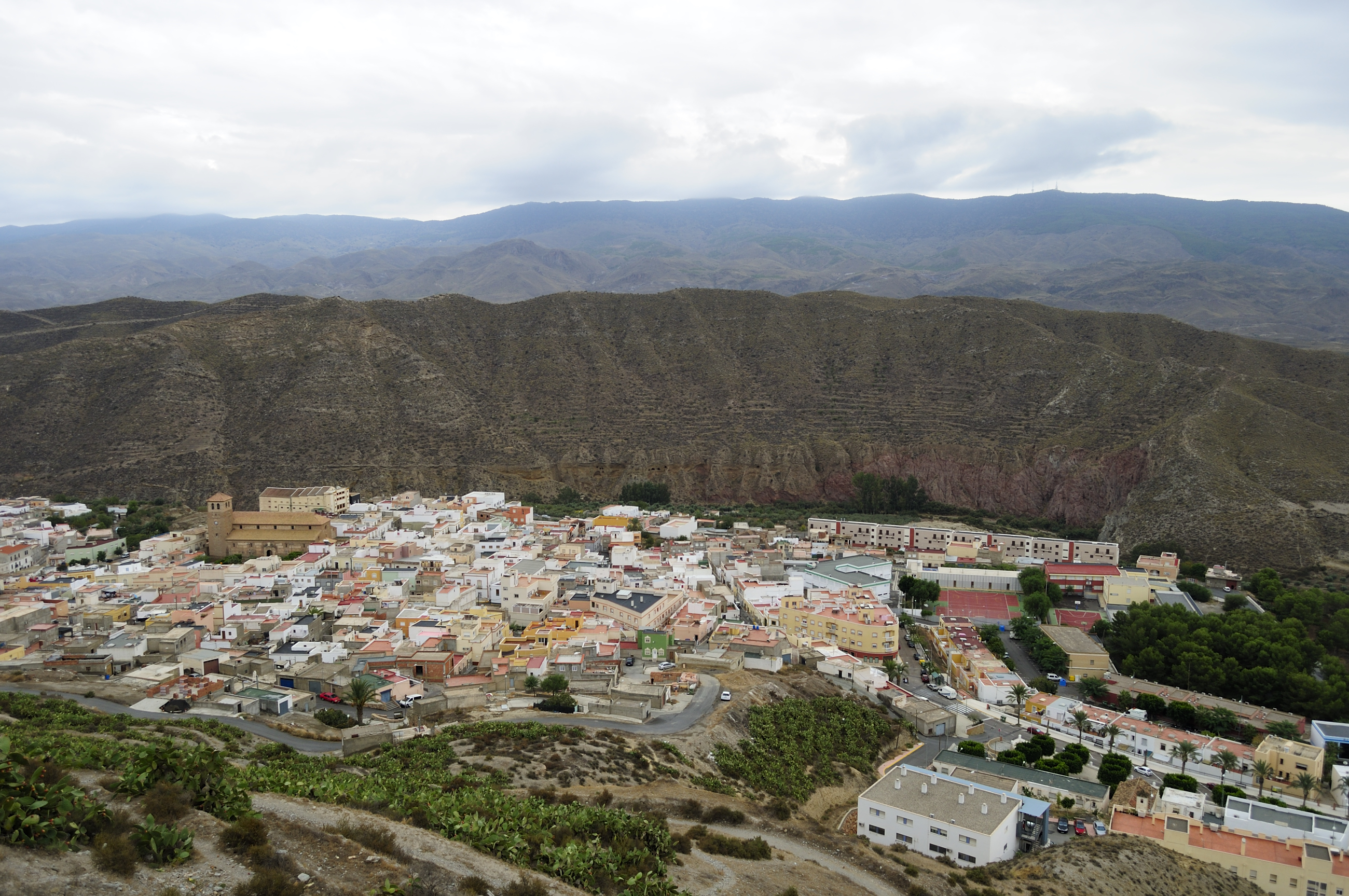 Desierto de Tabernas This is a photography of a Site of Community Importance in Spain with the ID: ES0000047. Natura2000 entry, EEA entry